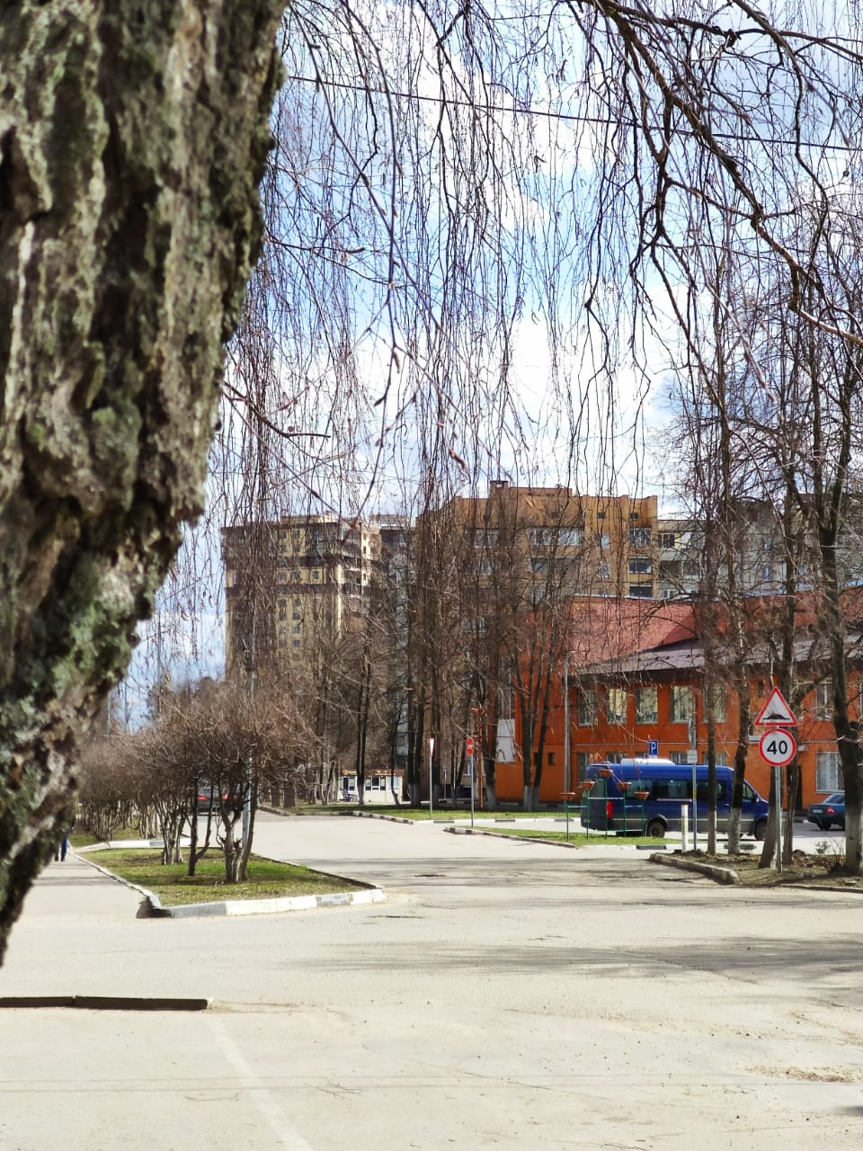 поселок Биокомбината